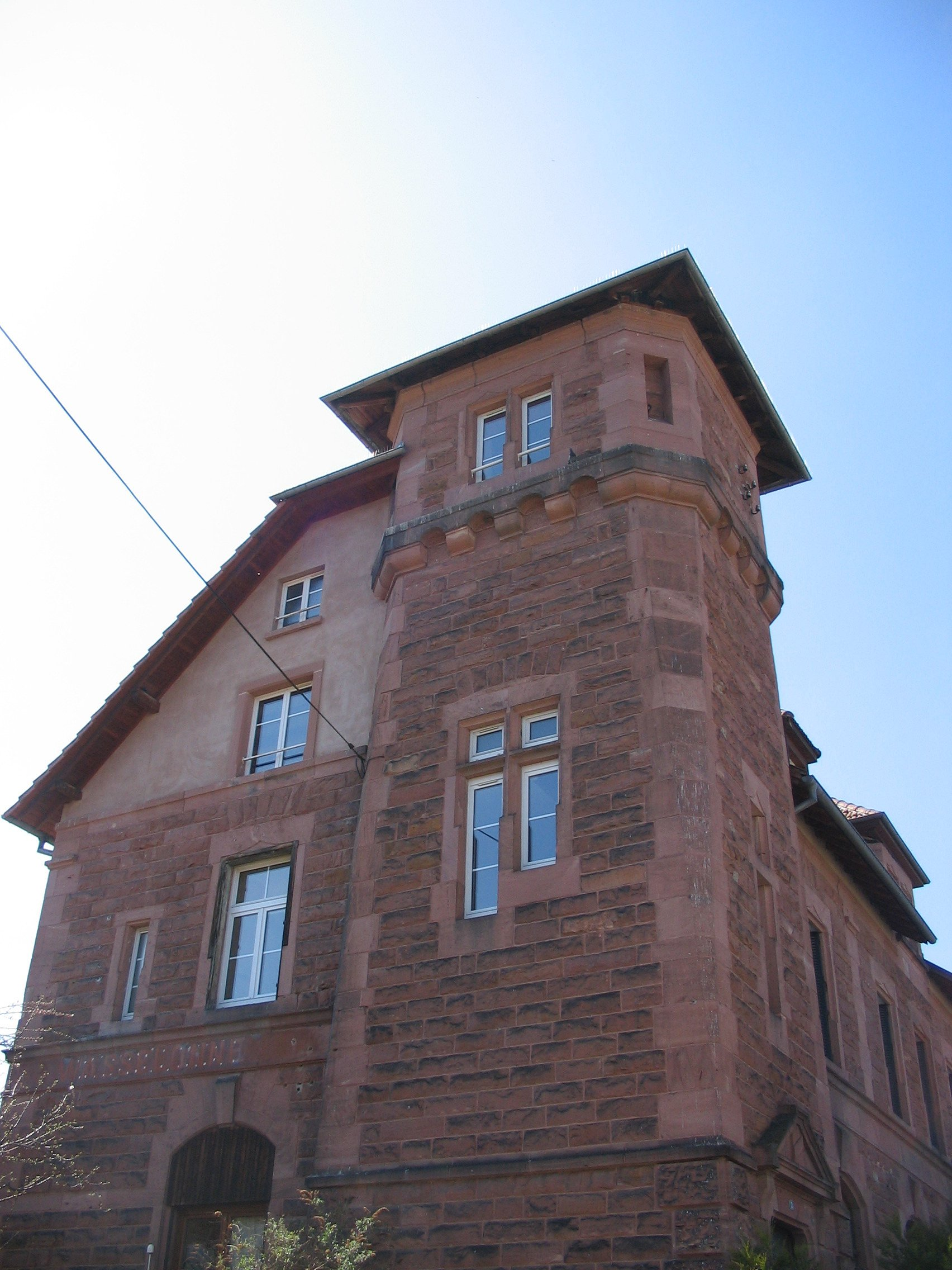 ancienne gare de Wasselonne (Bas-Rhin) sur la ligne Molsheim-Saverne. Détail sur la tour.